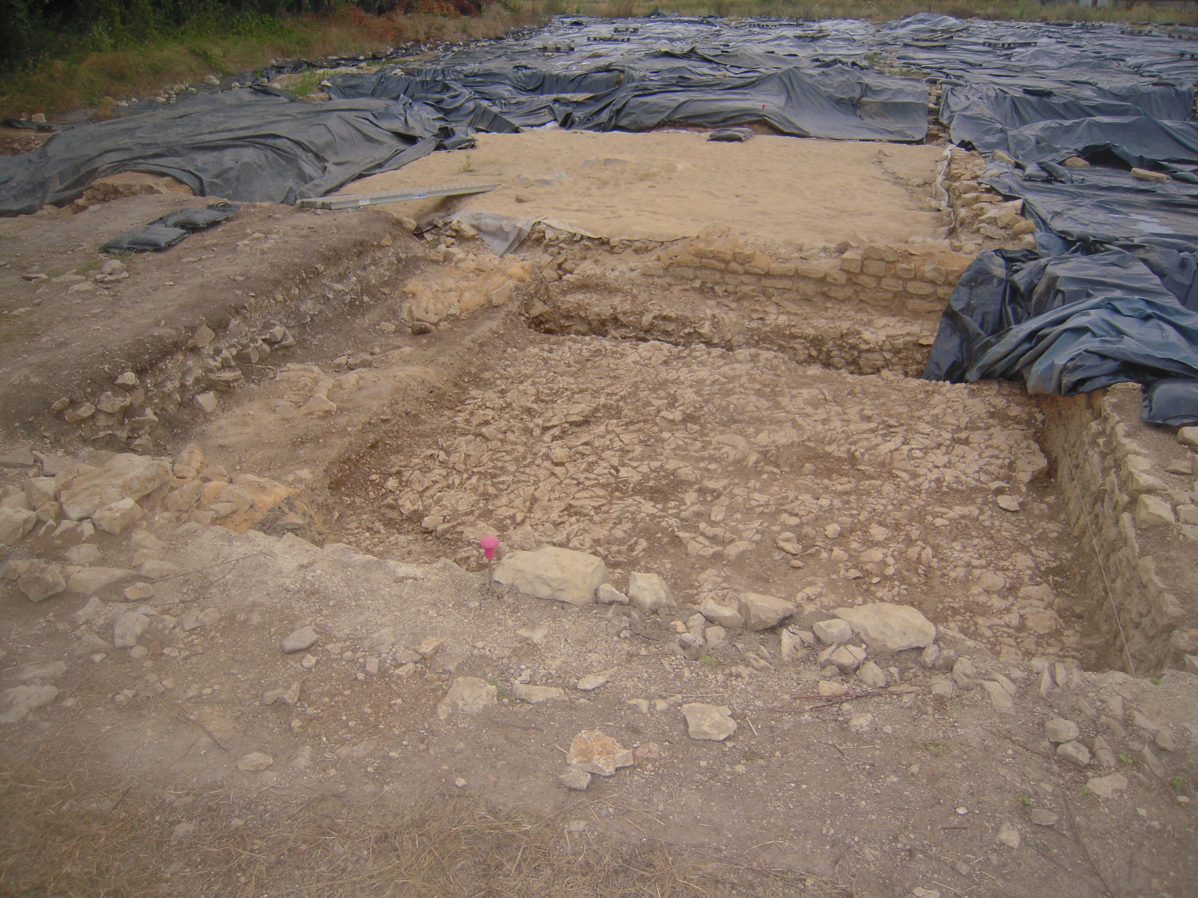 Fouilles archéologiques à Saint-Saturnin-du-Bois